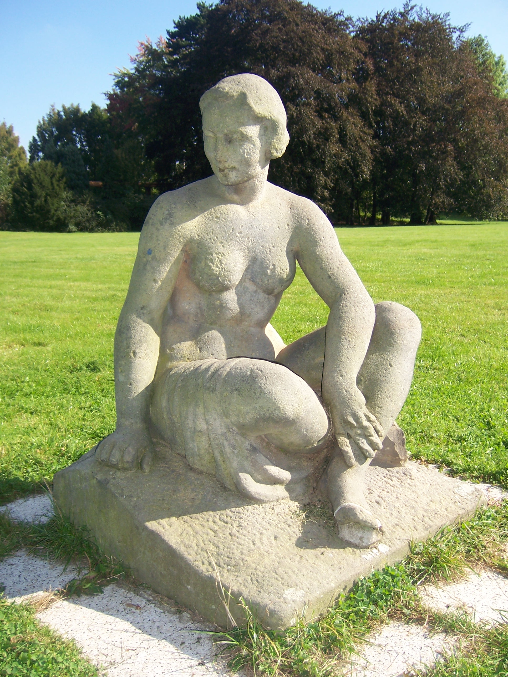 Alfred Thiele: Sitzende, 1939, Muschelkalkstein, Park Herfurthsche Villa, Markkleeberg